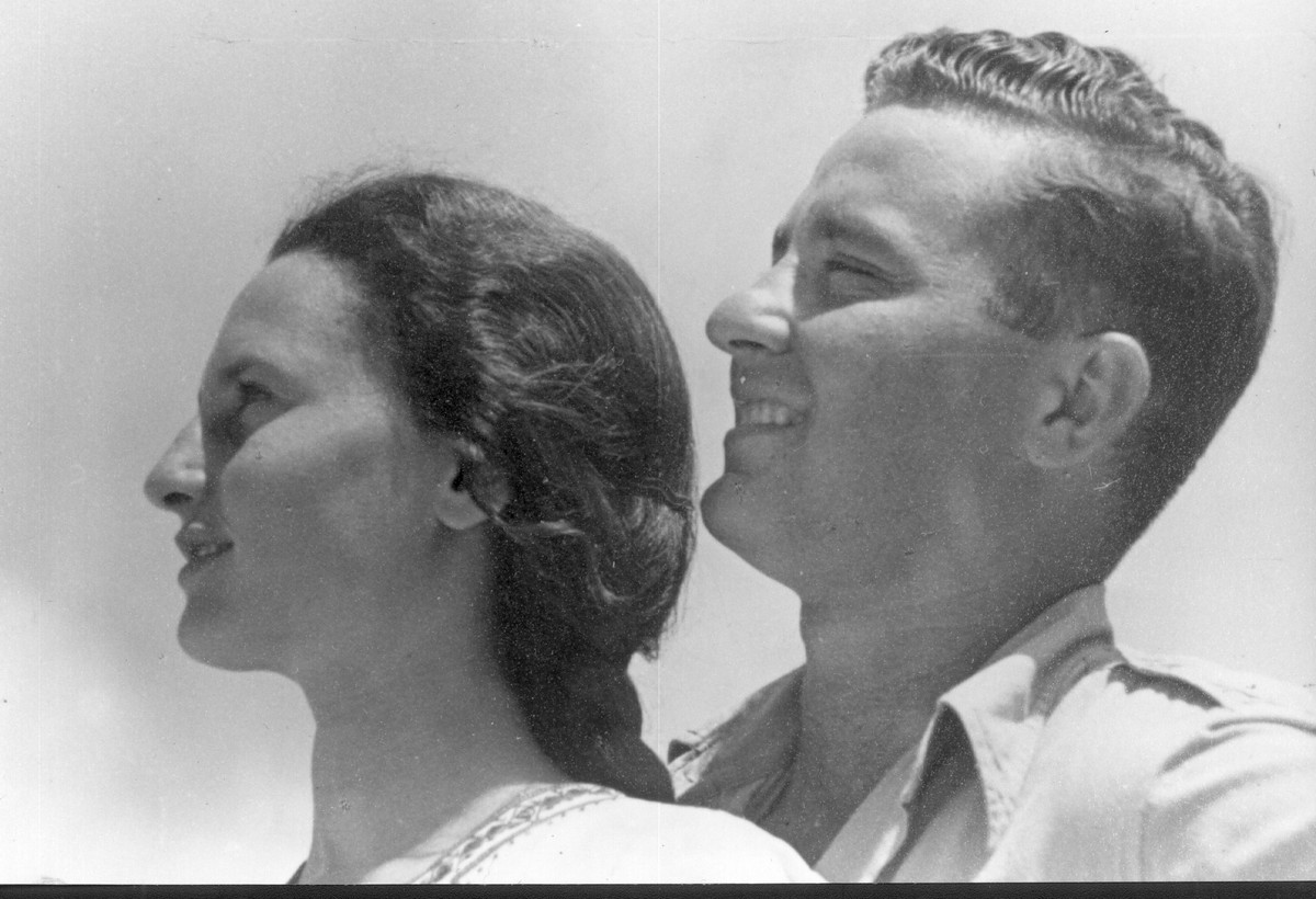 חטיבת יפתח - מטה החטיבה - פלמחניקים מן השורה - הכשרת מעוז,הגדוד הראשון. אסתר ויצחק (חקה) חופי